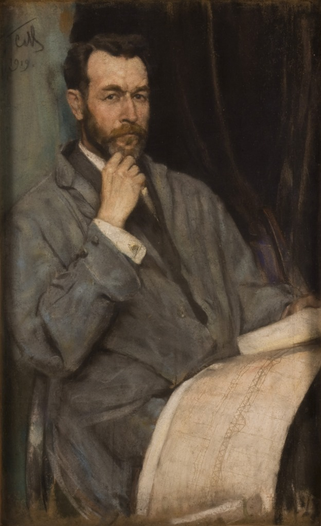 С. В. Малютин. Портрет Г. Пастель Передерия. 1919. Челябинская городская картинная галерея.